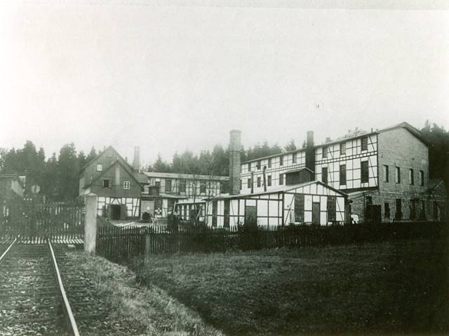 Historische Aufnahme von Grötzenberg, Gemeinde Nümbrecht, ca. 1915-1920 entstanden Metallwarenfabrik Limburg - heute Schuster.